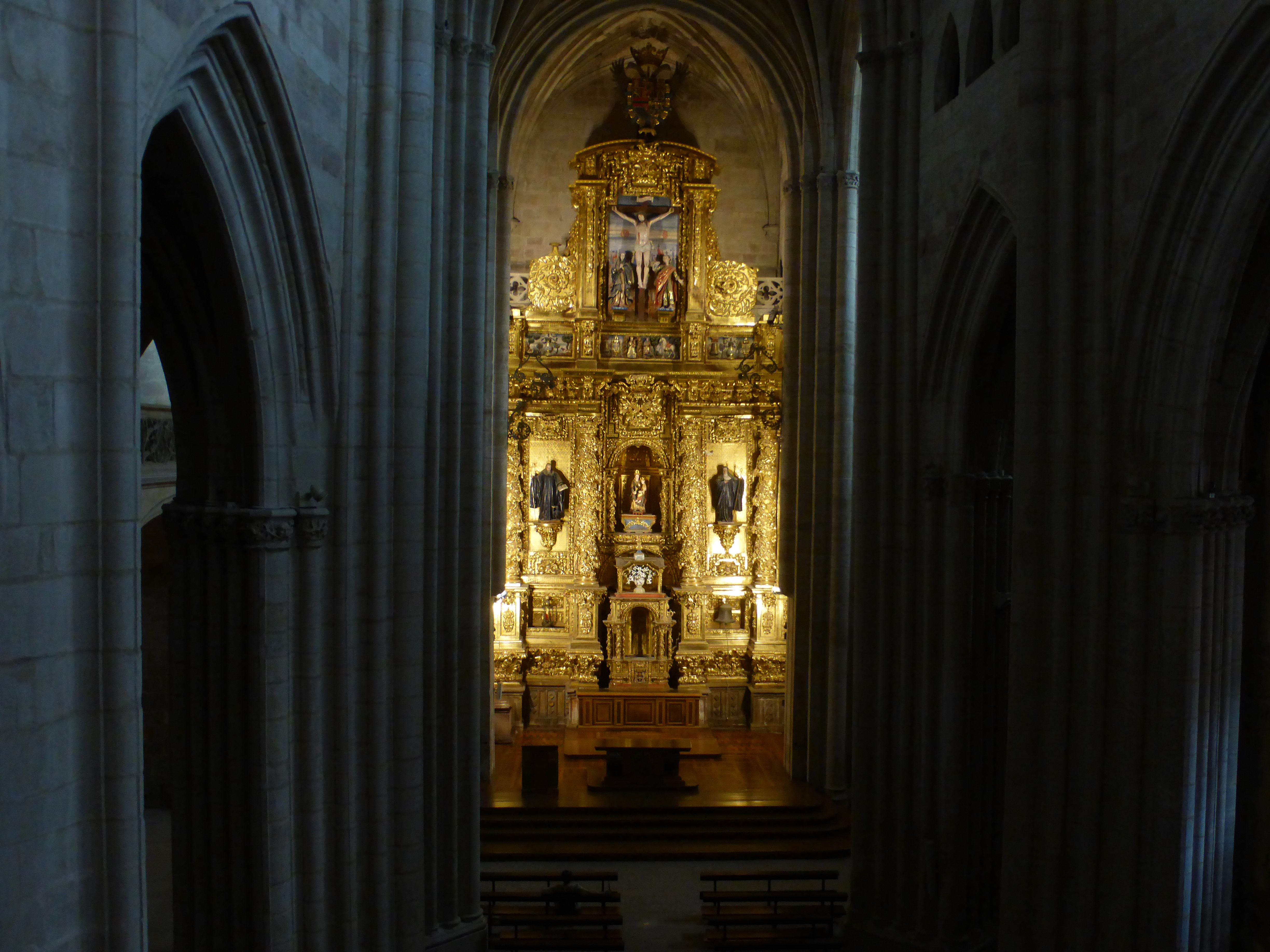 Arquitectura gótica de la iglesia del monasterio. En cambio, el retablo mayor es de estilo barroco, con columnas salomónicas.